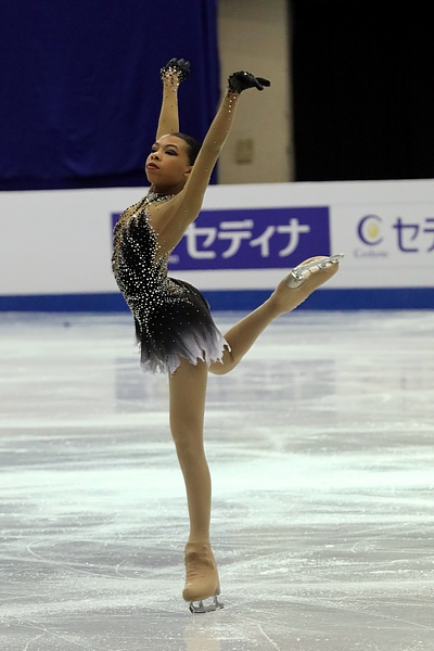 Старр Андреус (США) на чемпионате мира среди юниоров 2017